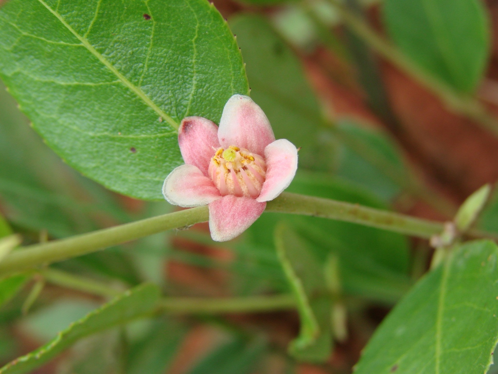 Casearia altiplanensis Sleumer - SALICACEAE - Jardim Botânico de Brasília - Brasília - Distrito Federal - Brasil.